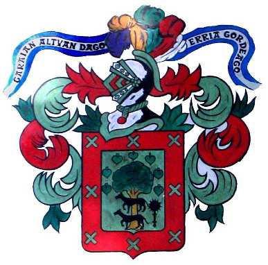 Escudo de Garai, Vizcaya, País Vaco, España.